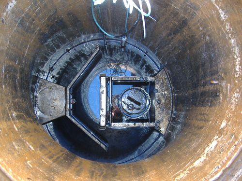 Blick von oben in den alten Benzinabscheider einer Tankstelle